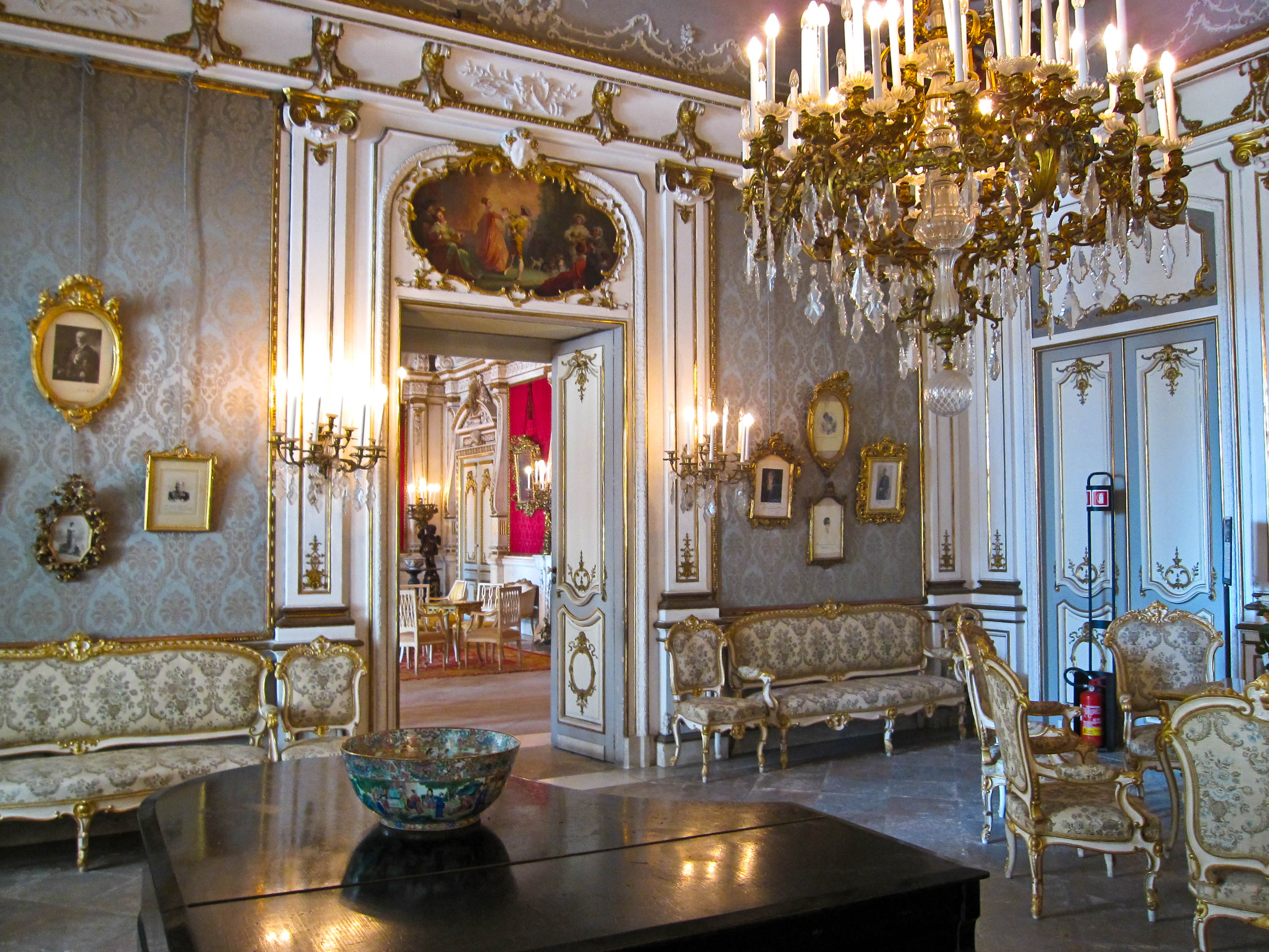 Interno di Villa Pignatelli (Napoli).